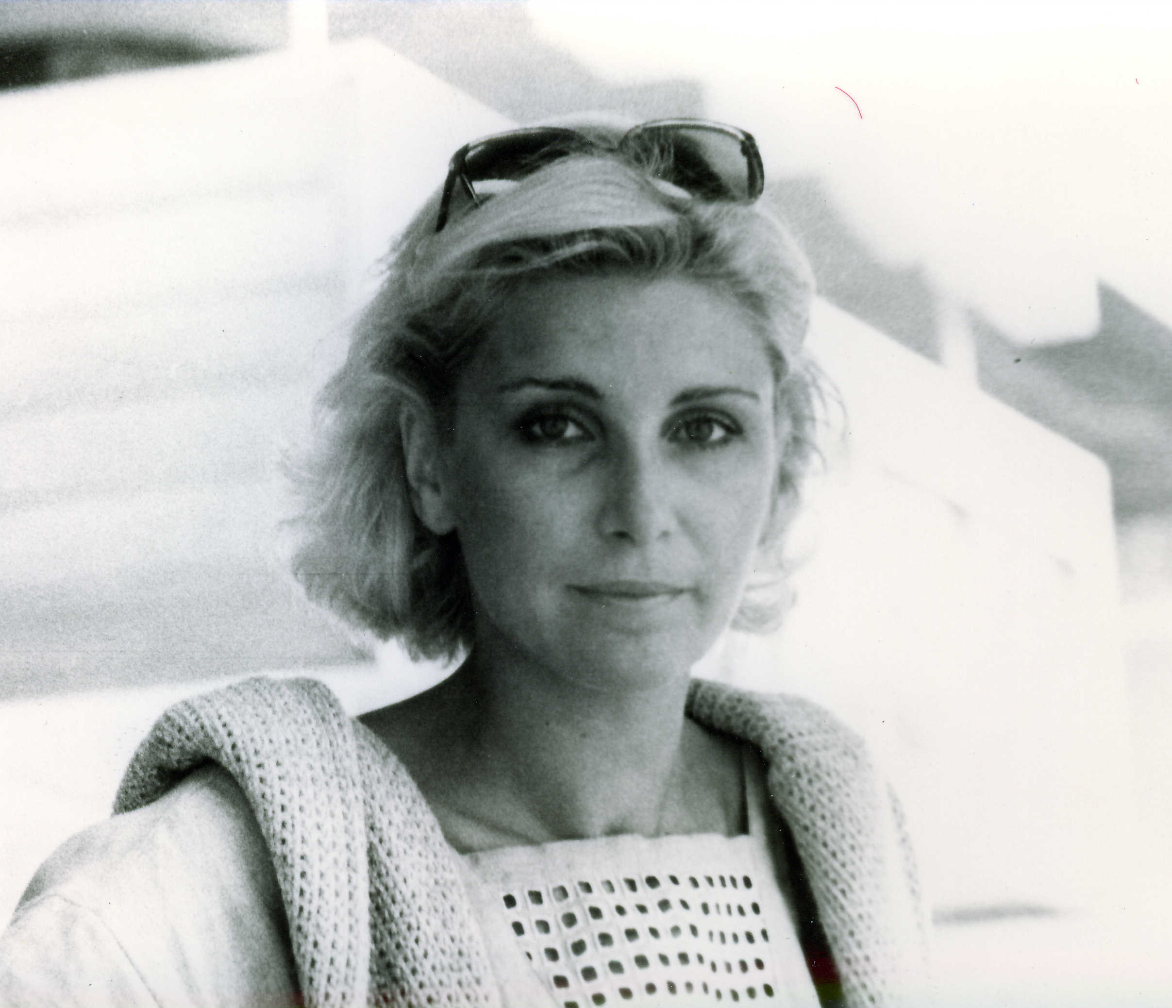 Slovenačka glumica Savina Geršak na Filmskim susretima u Nišu 1984. godine